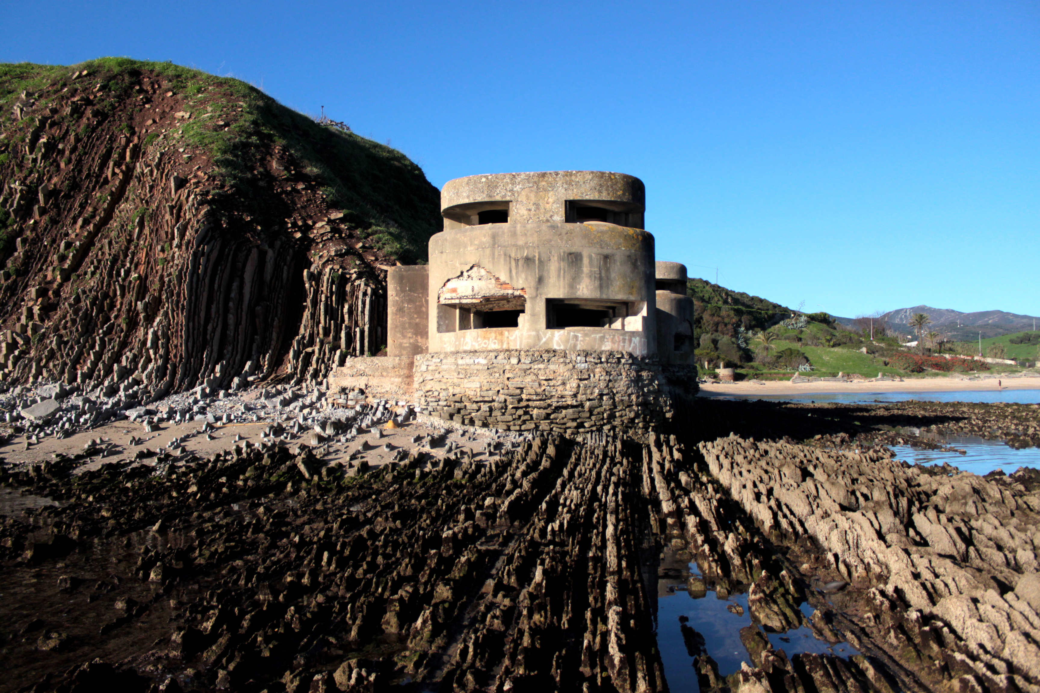 Búnker siturado en el extremo de la Punta de Getares, al sur de la población de Algeciras para la defensa de la Ensenada de Getares. Algeciras, Andalucía, España.